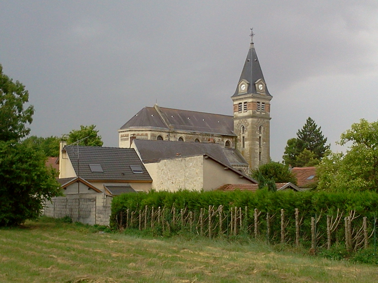 Vue de l'église Sainte Marie-Madeleine d'Heutrégiville depuis le cimetière.